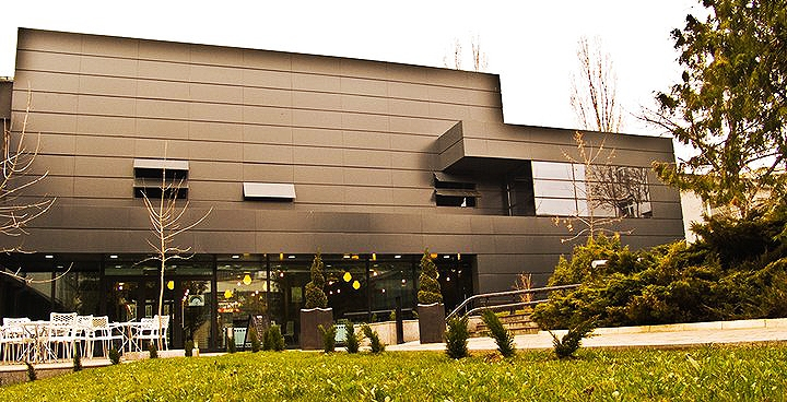 Университетски театър на НБУ